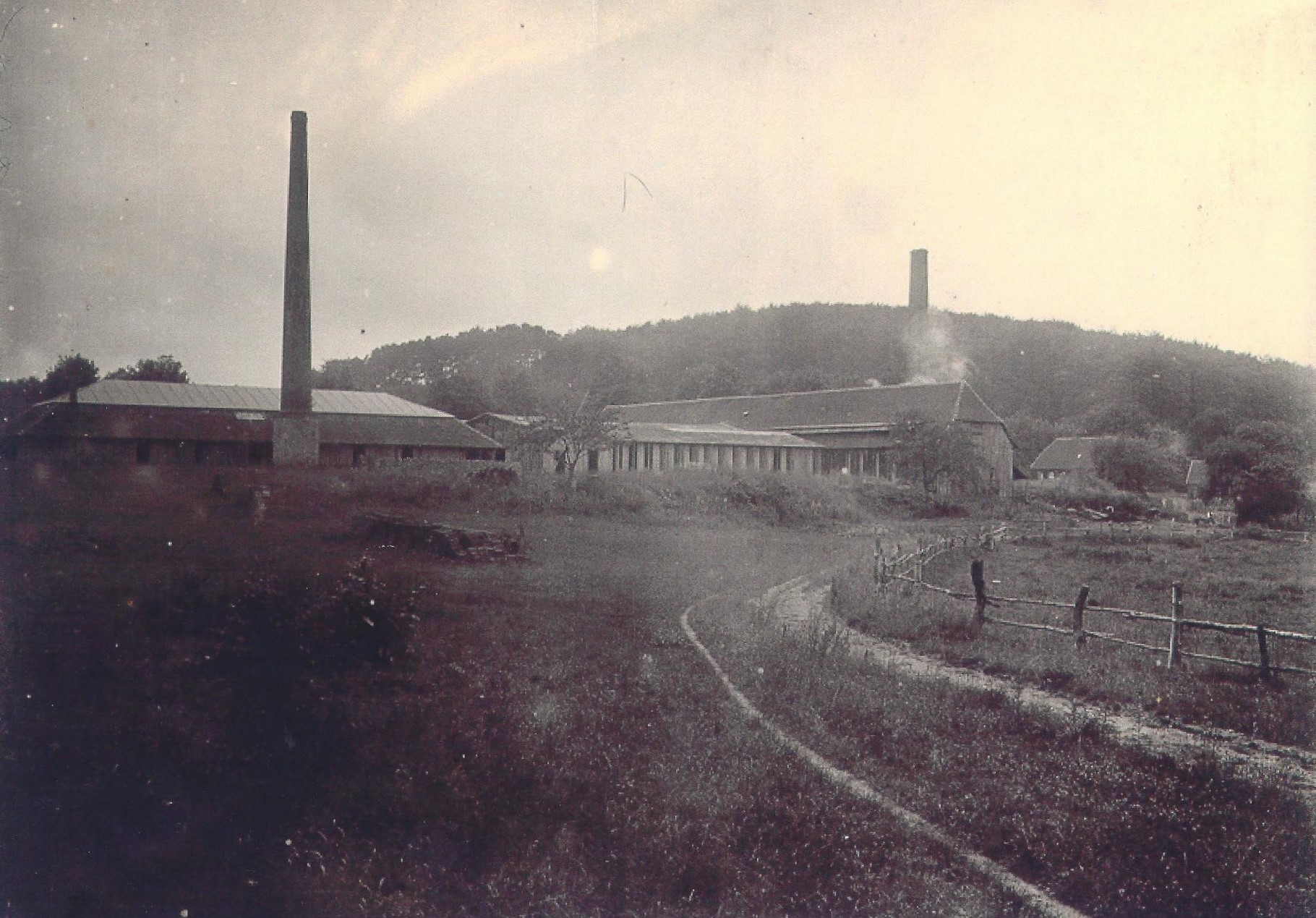 Ziegelei am Hellberg nördlich von Goldberg (Mecklenburg)